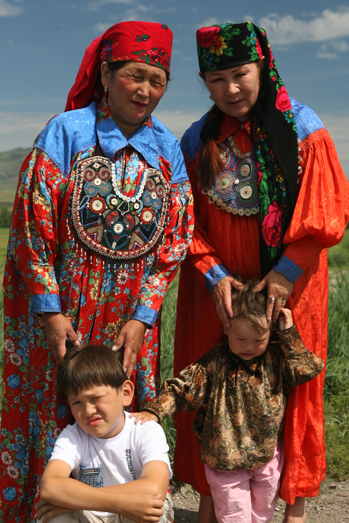 Хакаски с детьми в начале XXI века